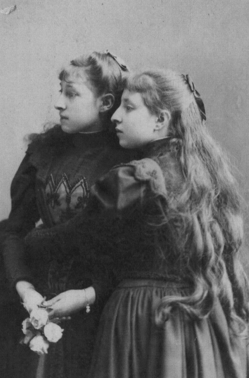 Hermanas Elena y María de la Luz Barrios Aparicio en 1885, aproximadamente.